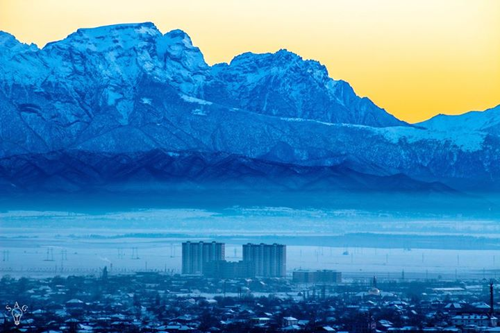 Назрань на фоне горы Столовая (Матт-лоам)